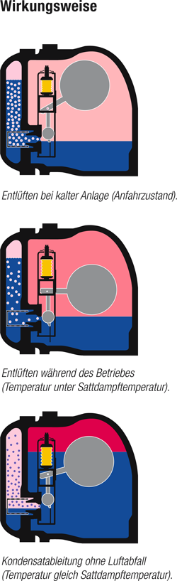 Funktionsweise Schwimmerableiter mit Faltenbalg